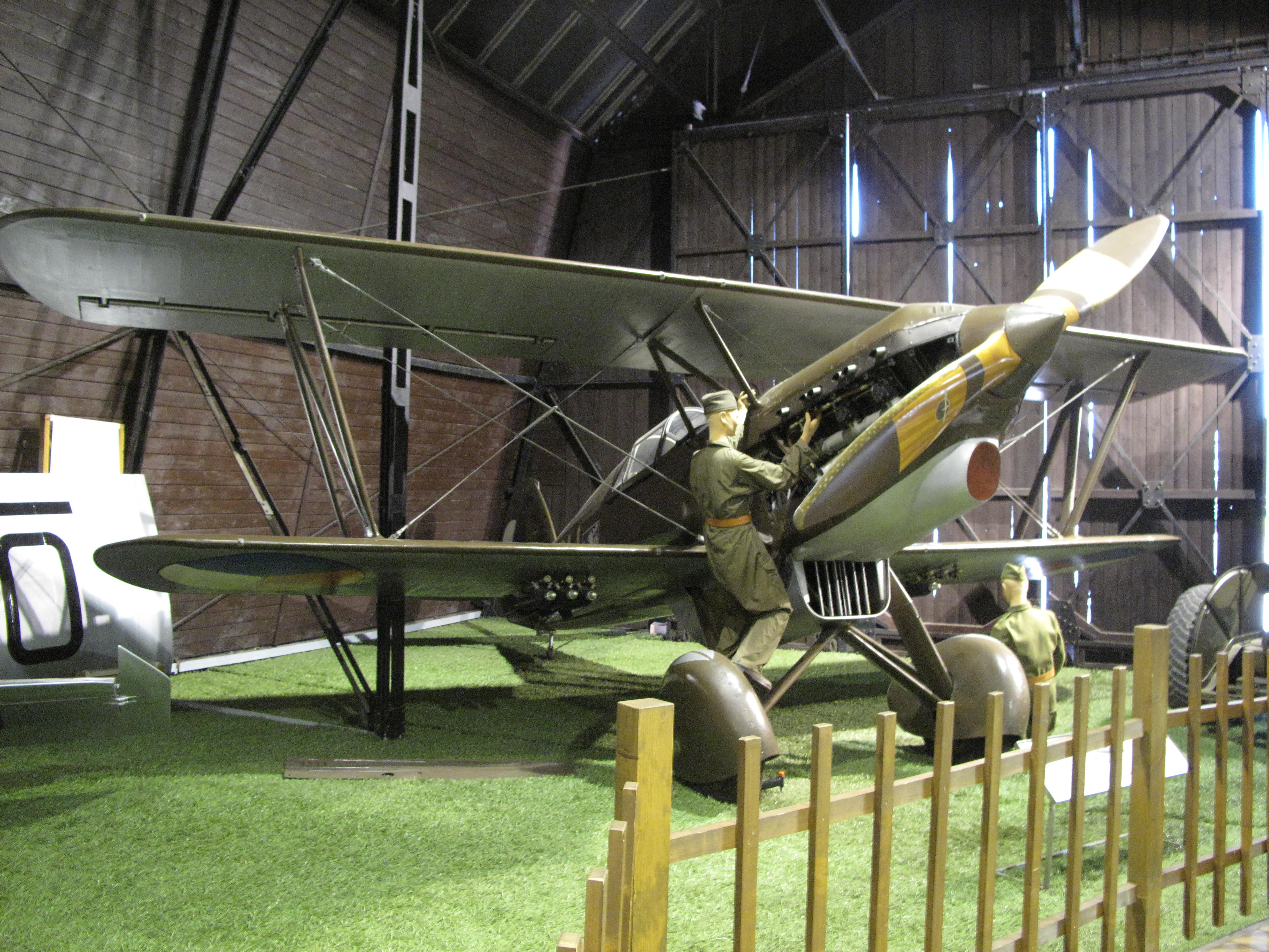 Avia B.534, Letecké muzeum Kbely